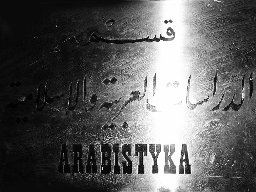 Tabliczka na drzwiach wejściowych do Katedry Arabistyki i Islamistyki UW